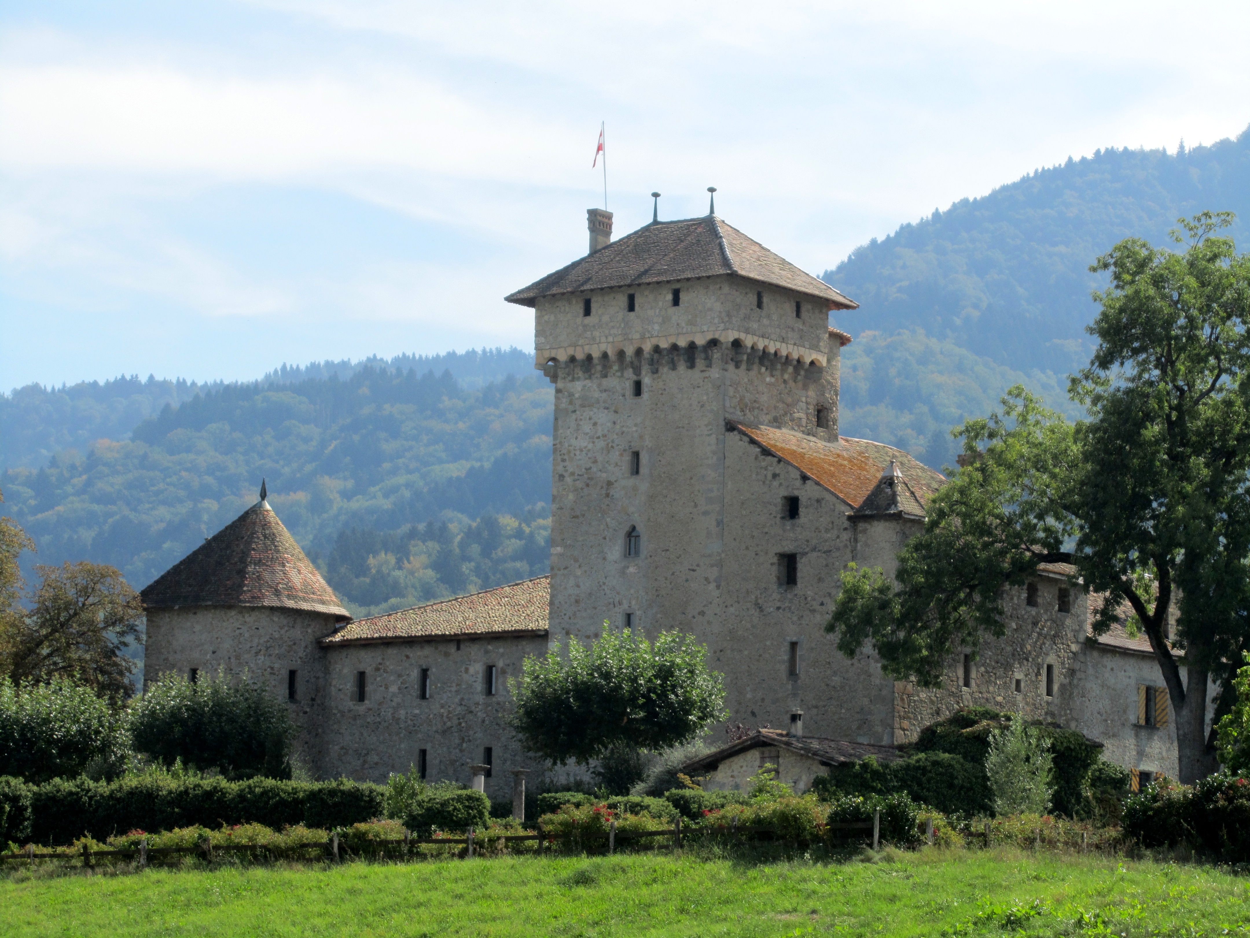 Vue sur le parc du château d'Avully, situé à Brenthonne (Haute-Savoie)